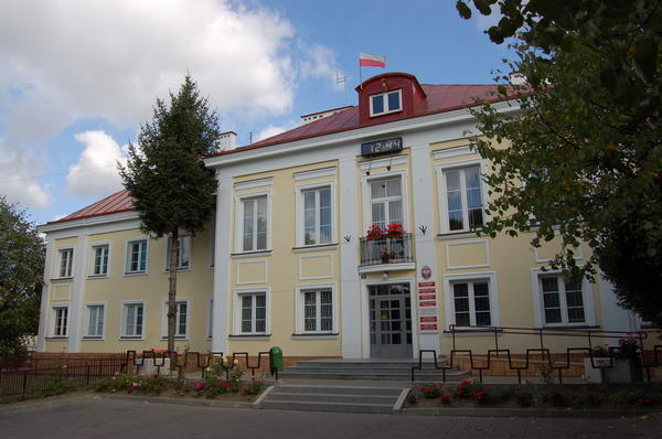 Домброва Тарновска.